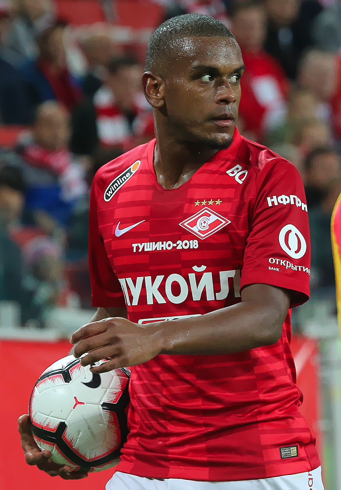 «Спартак» потерпел первое поражение в чемпионате, уступив «Ахмату»